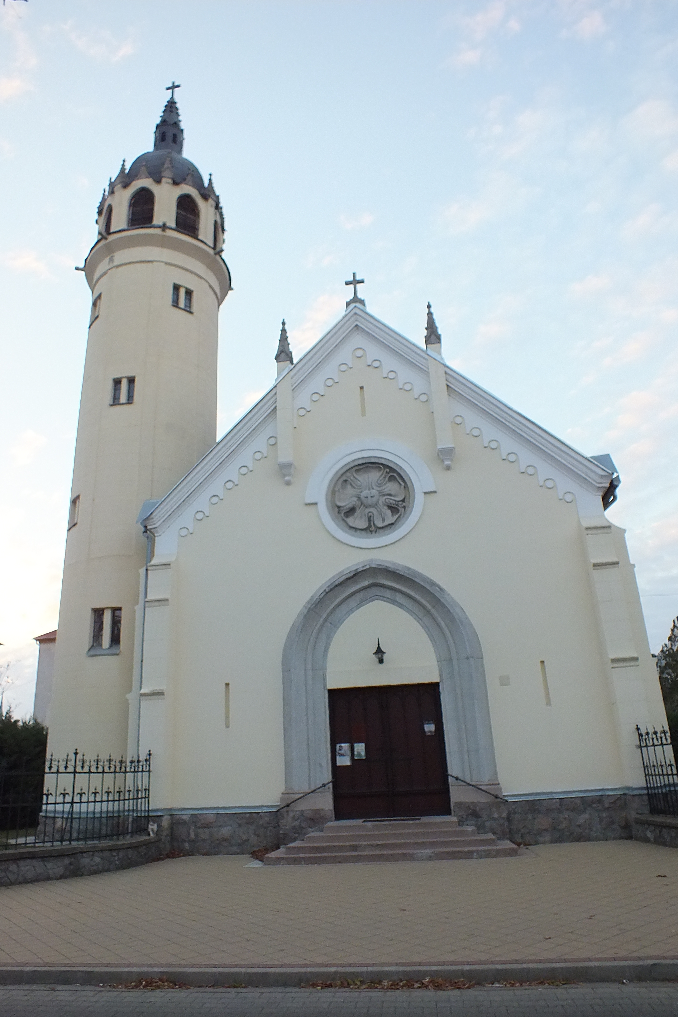 євангельська церква в місті Сольнок